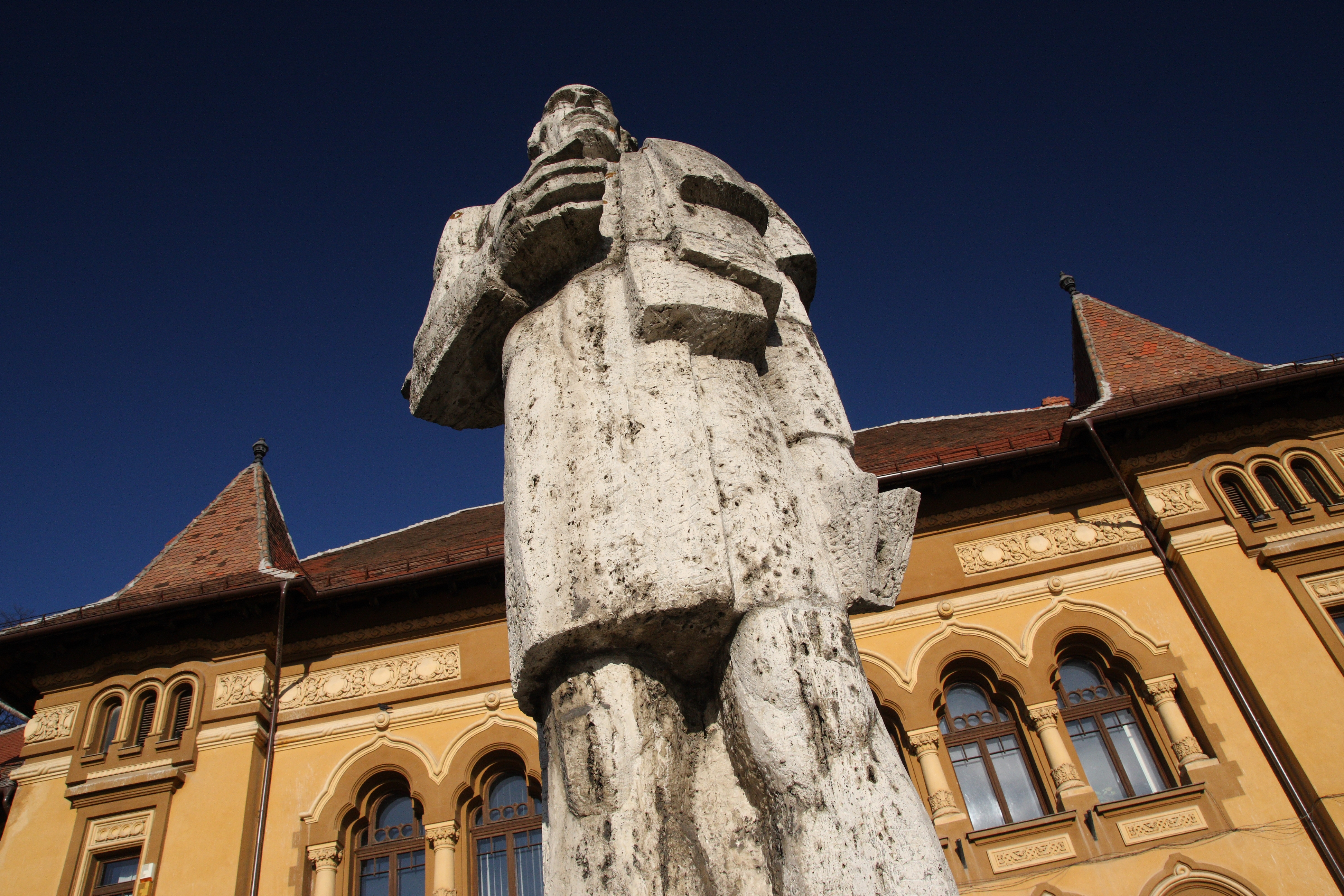 Biblioteca Judeteana George Baritiu, Brasov, Romania